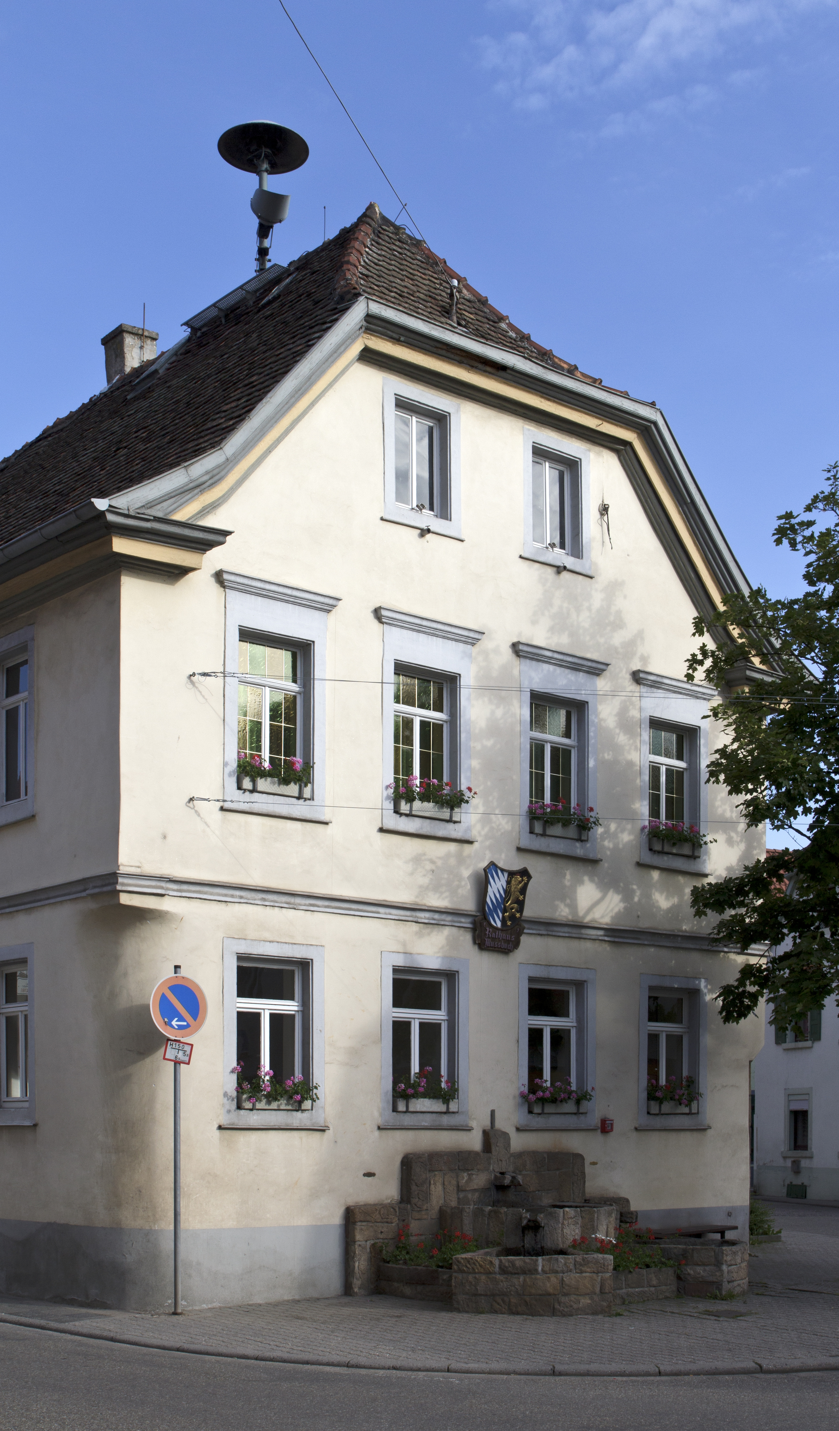 Das Rathaus in Neustadt an der Weinstraße, Stadtteil Mußbach